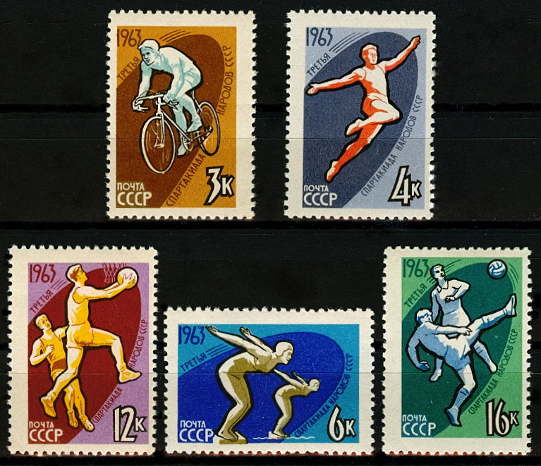 Почтовая марка